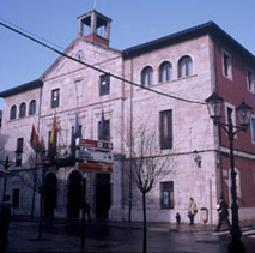 Ayuntamiento de Llanes